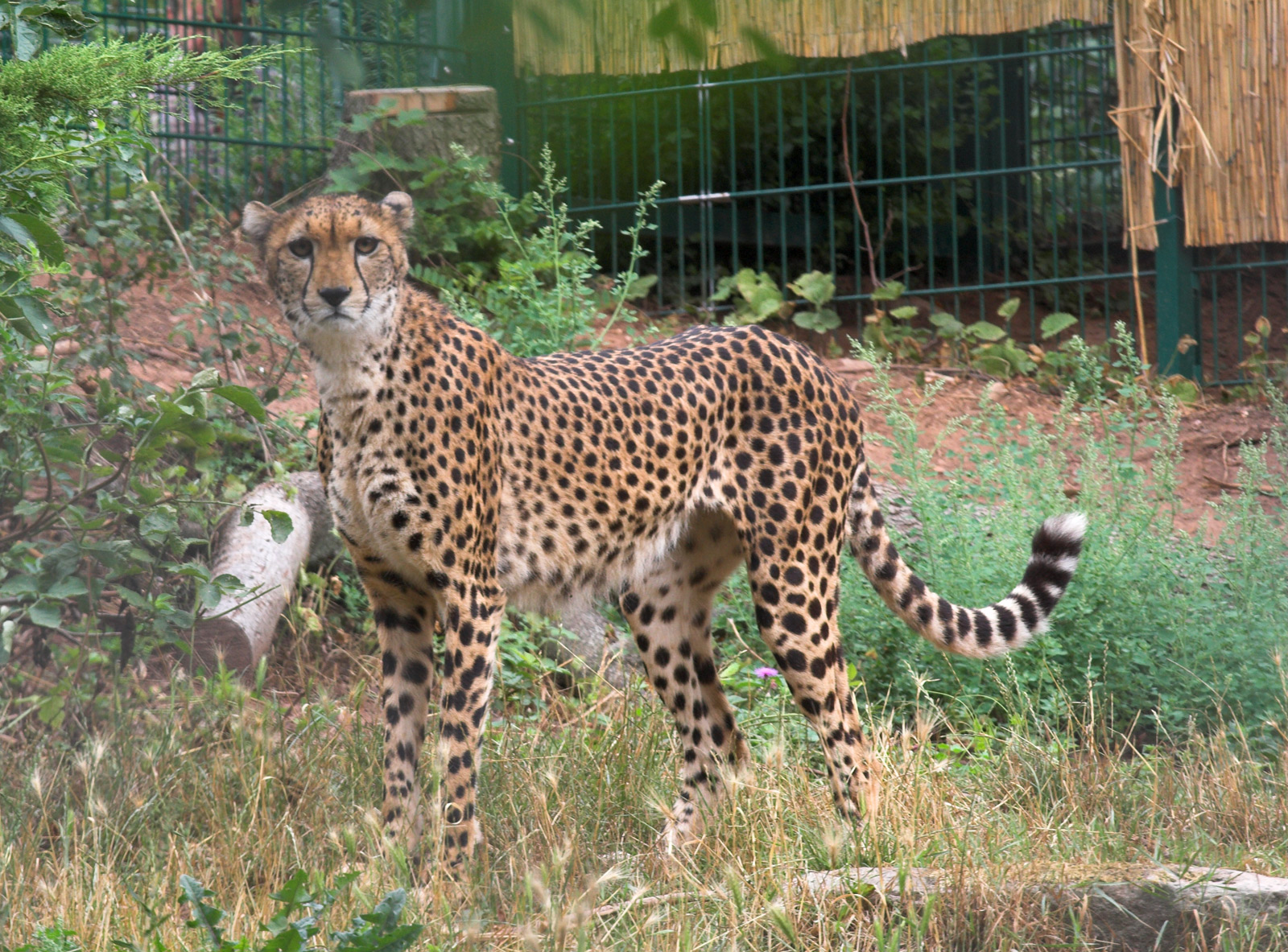 Acinonyx jubatus soemmeringii (Gepard), female animal